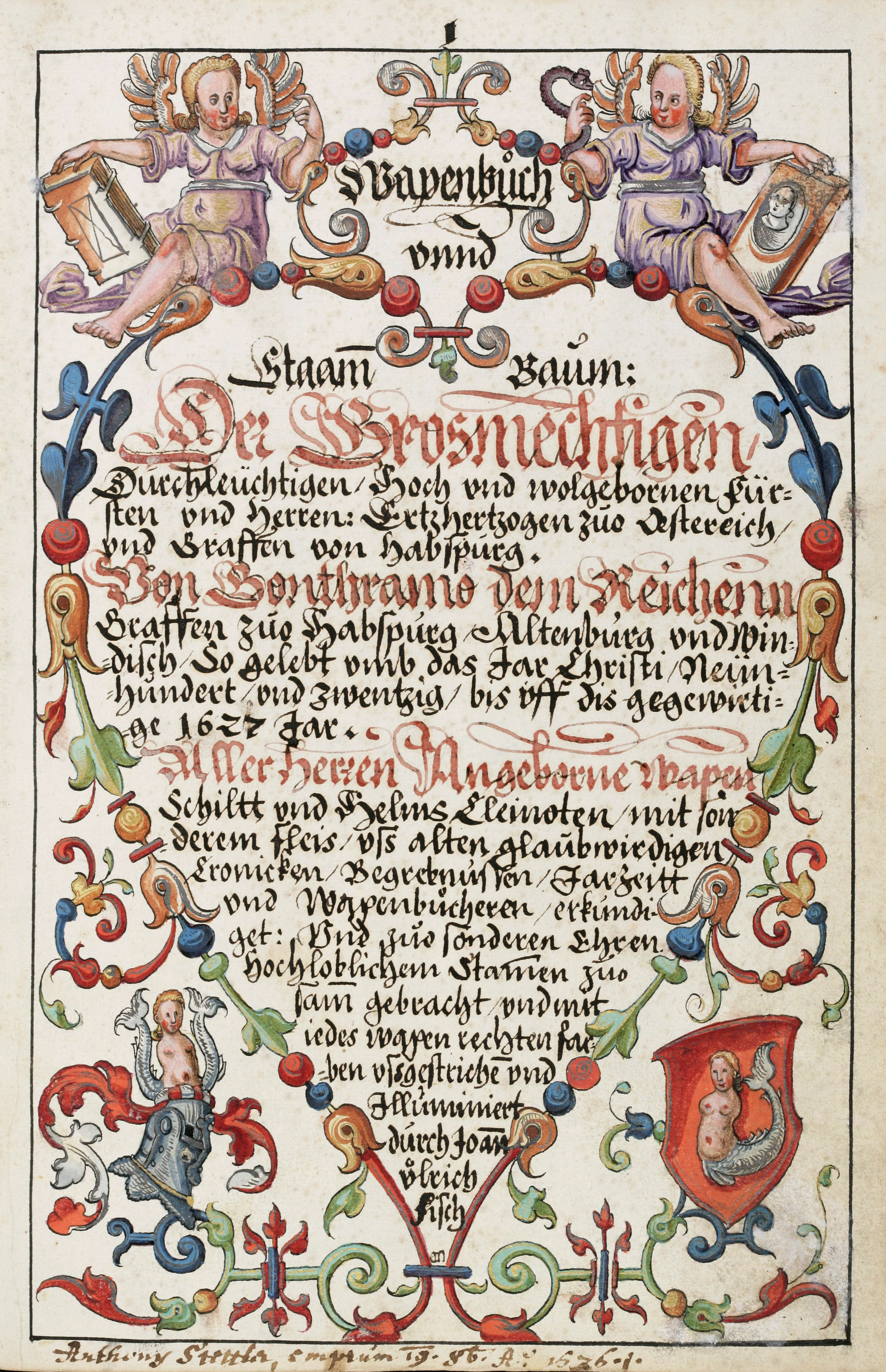 Wappenbuch des Hans Ulrich Fisch. Papier, 31.5 x 19.5 cm, Aarau 1627. Aarau, Staatsarchiv Aargau, V/4-1985/0001, fol. Vr, Titelseite